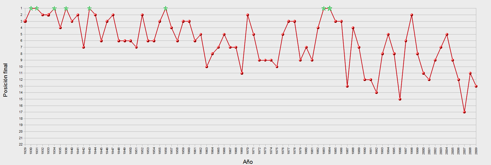 Evolución histórica del Athletic Club en liga.